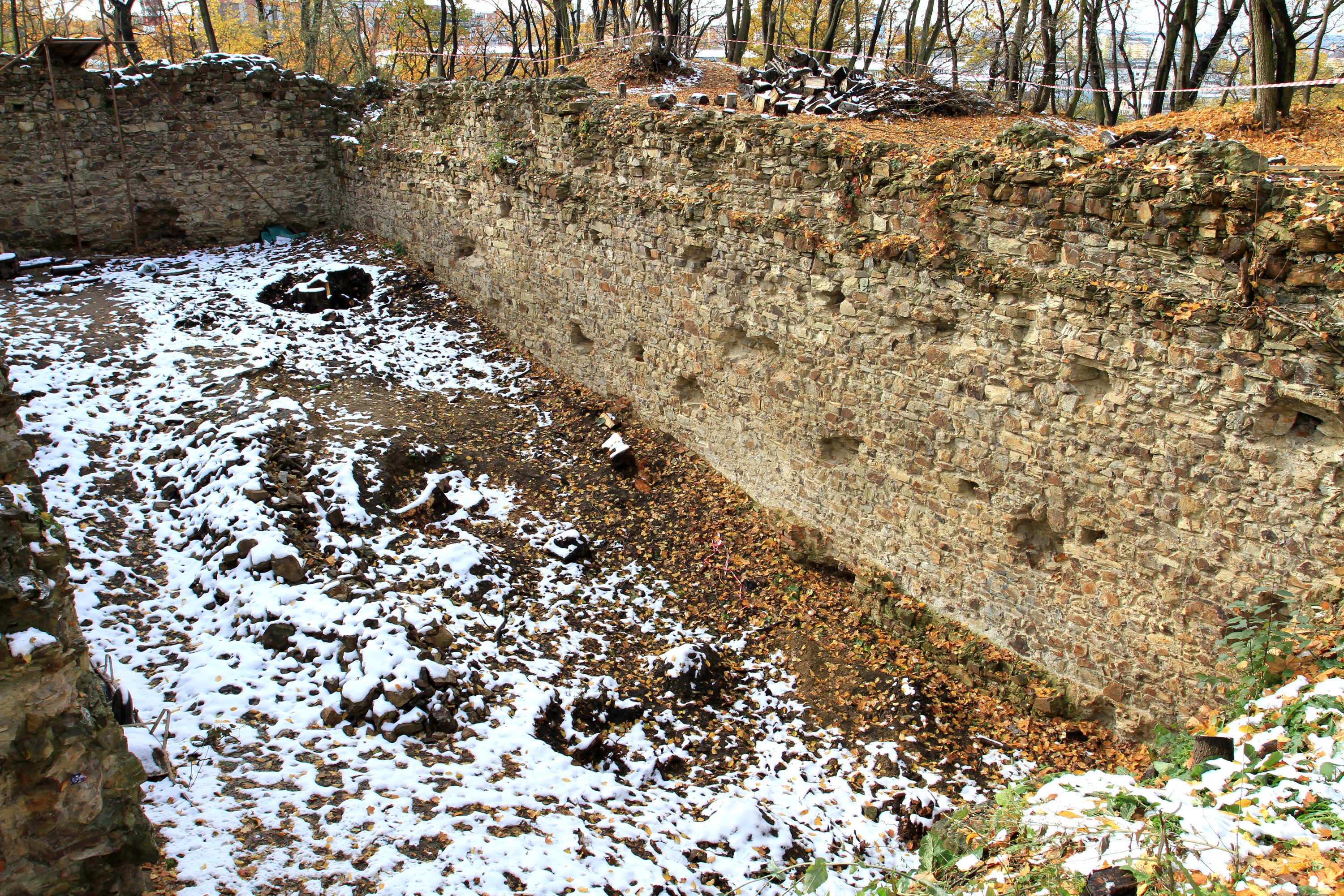 Nový hrad (Kunratice), Praha-Kunratice, na skalnatém ostrohu v Kunratickém lese